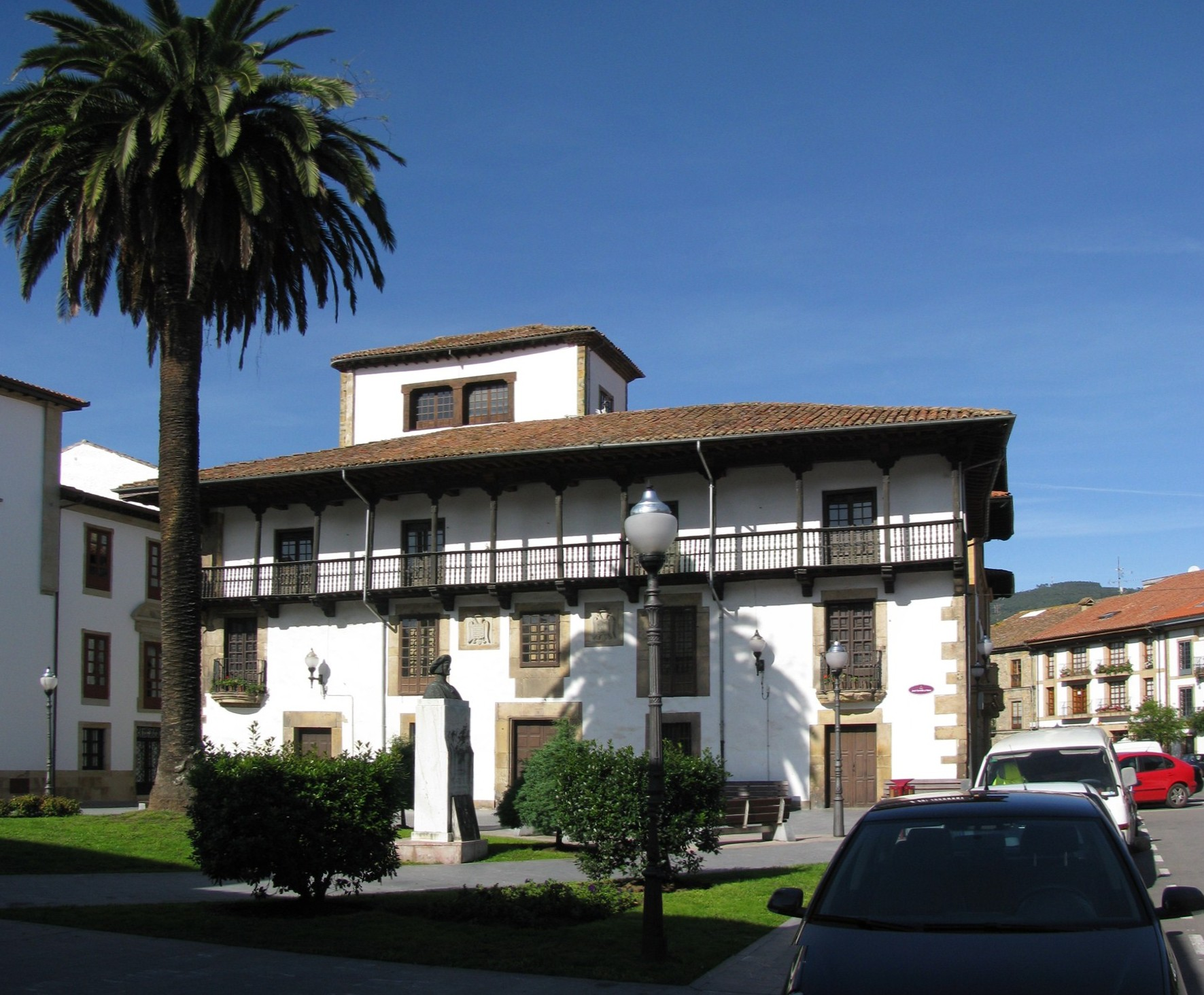 Plaza Carlos I - Villaviciosa